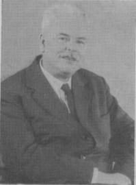 Branimir Gušić.